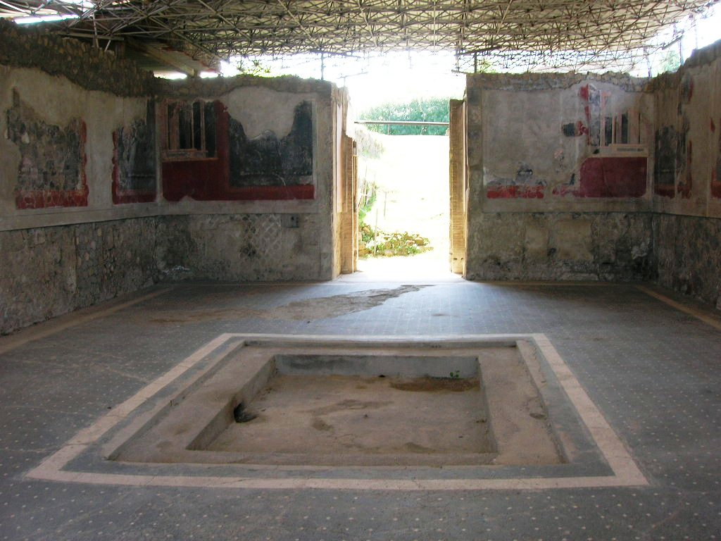 Impluvium della Villa di Arianna a Stabia. Foto di user:Mentnafunangann, 15 agosto 2006.